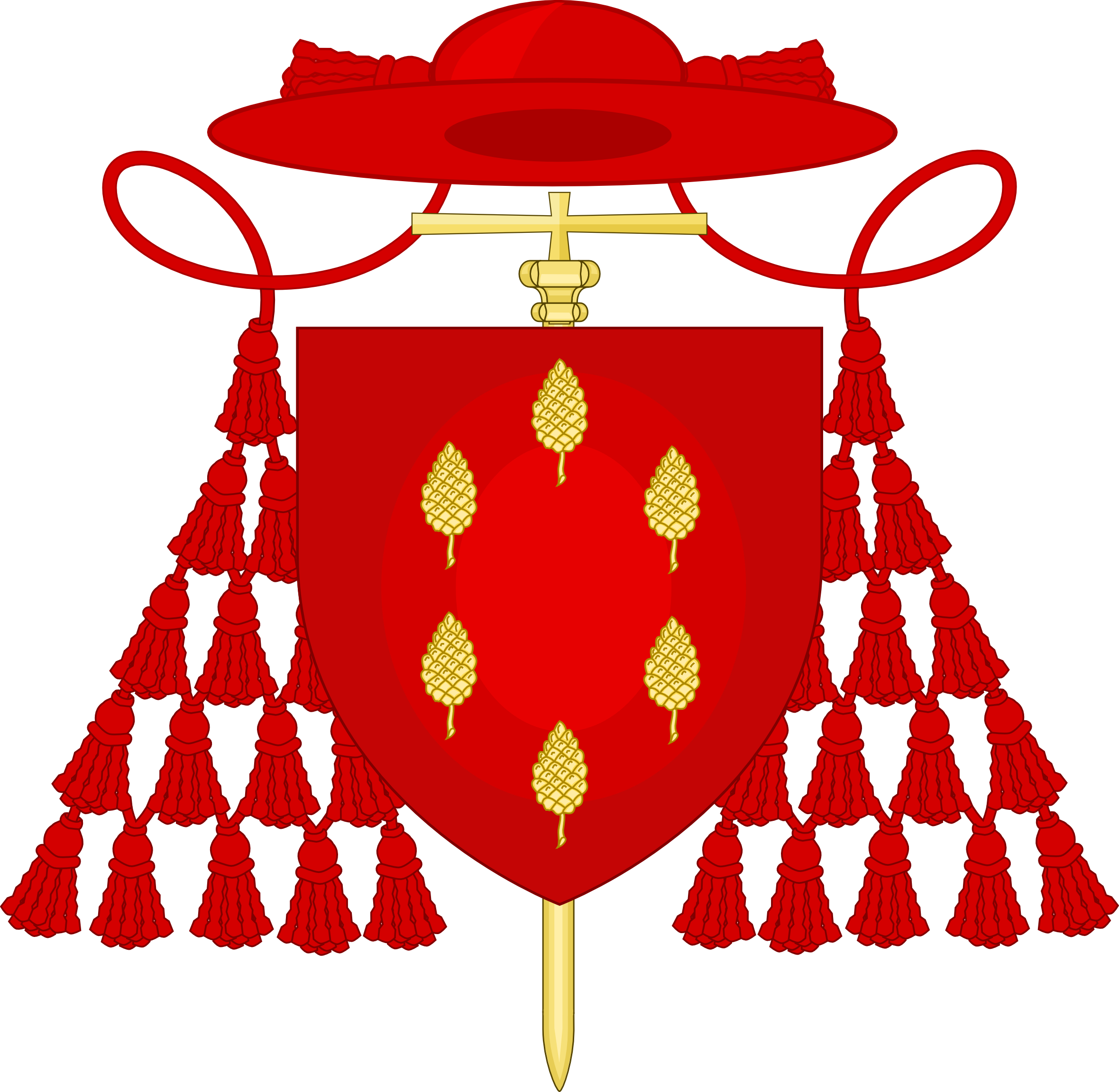 Stemma dei Roberto Francesco Romolo Bellarmino.